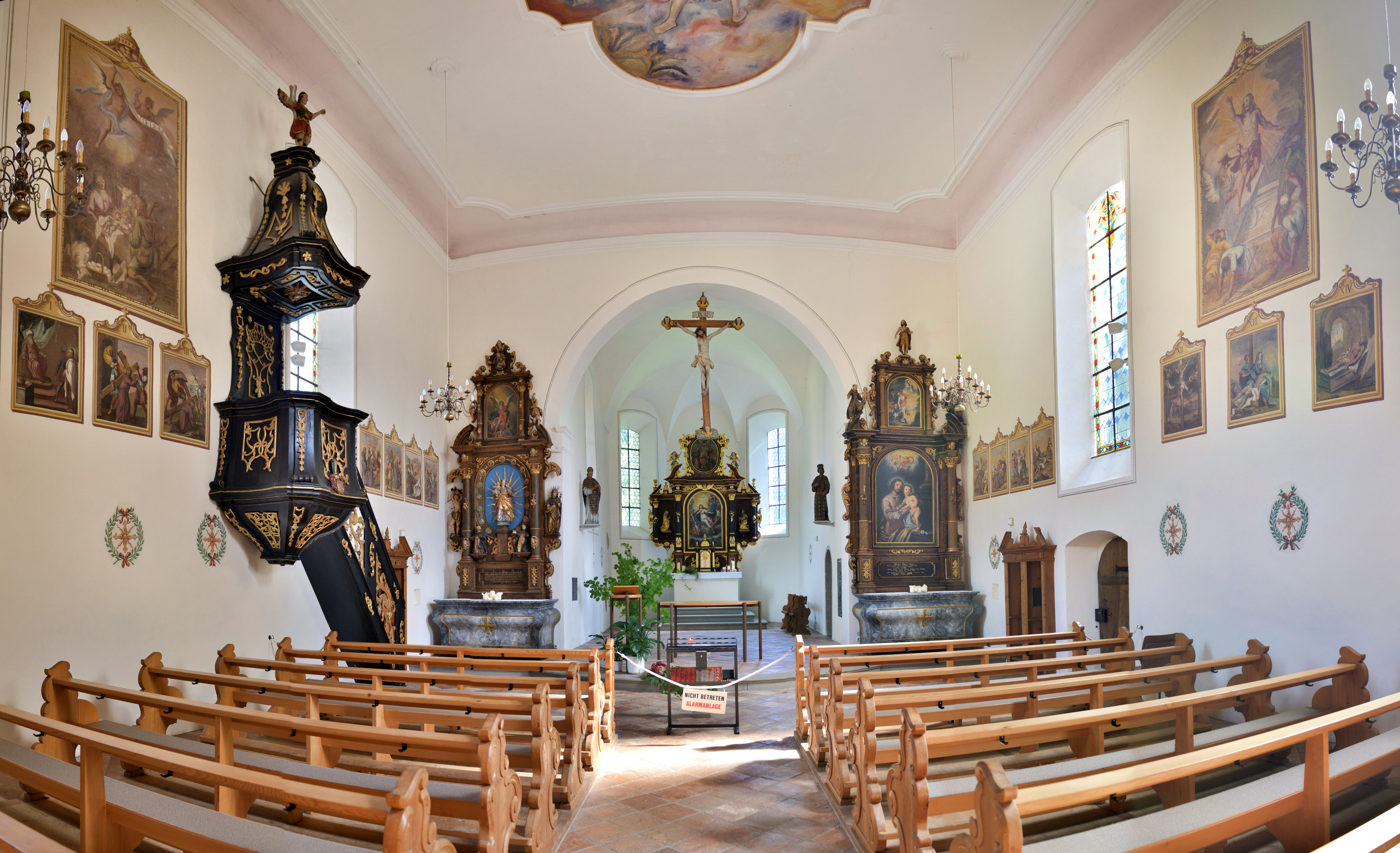 Alte Pfarrkirche Hll. Cornelius und Cyprian, in Tosters bei Feldkirch in Vorarlberg.